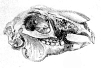 Schädel vom Hasen